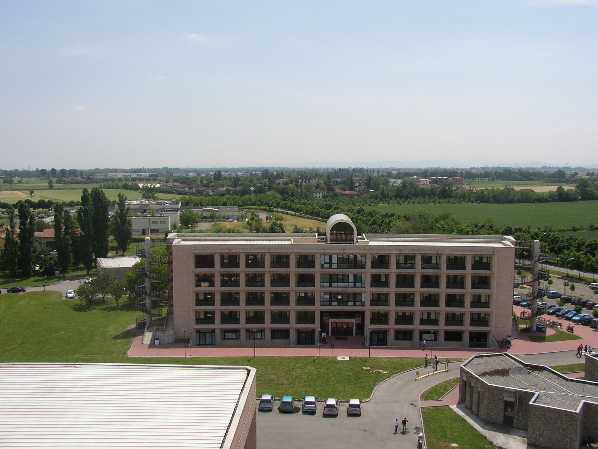 Dipartimento di Matematica dell'Università degli Studi di Parma